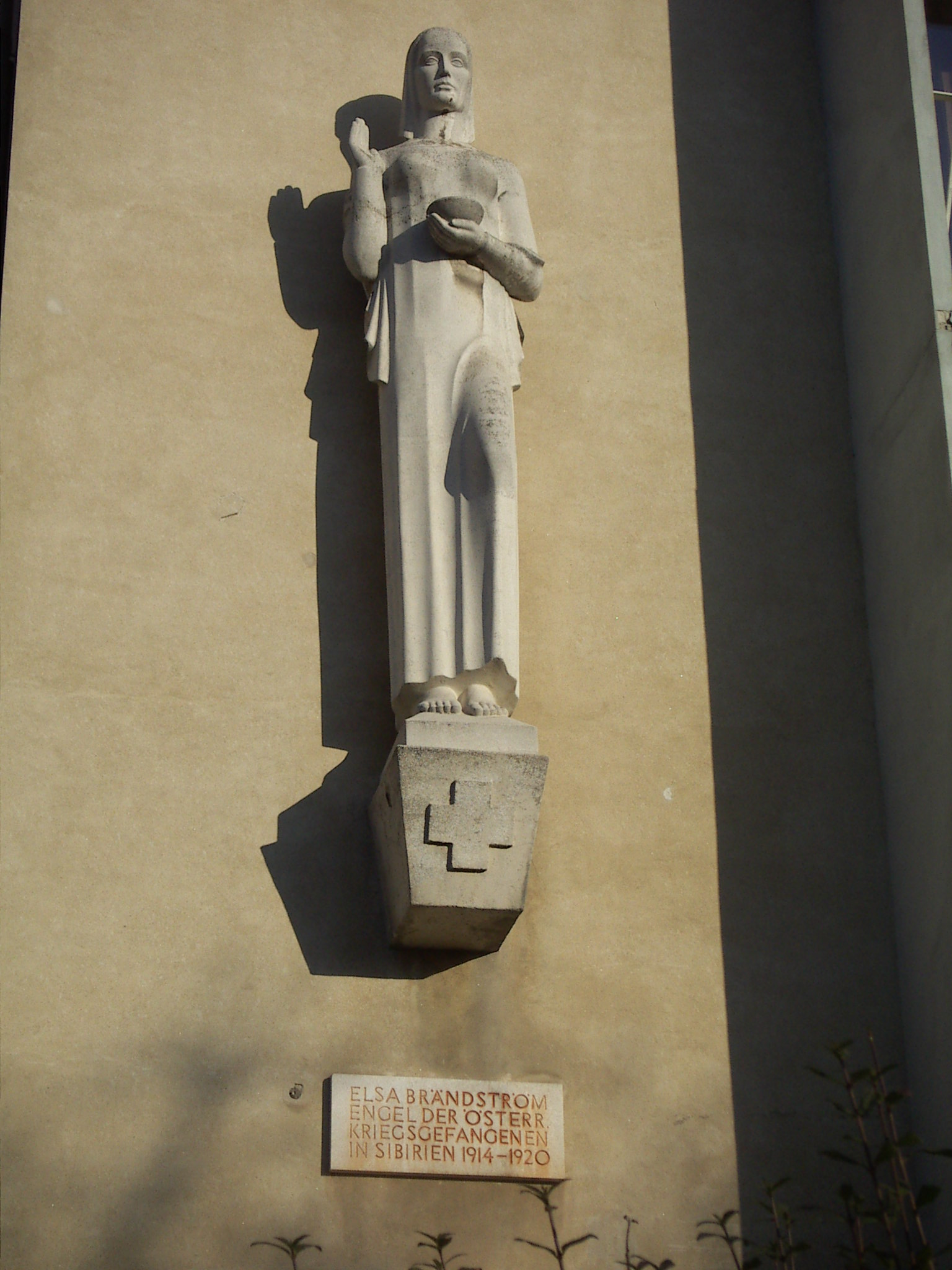 Elsa Brändström, in der Brandströmgasse in Krems an der Donau, Skulptur an einer Wohnhausanlage, Bildhauer: ?